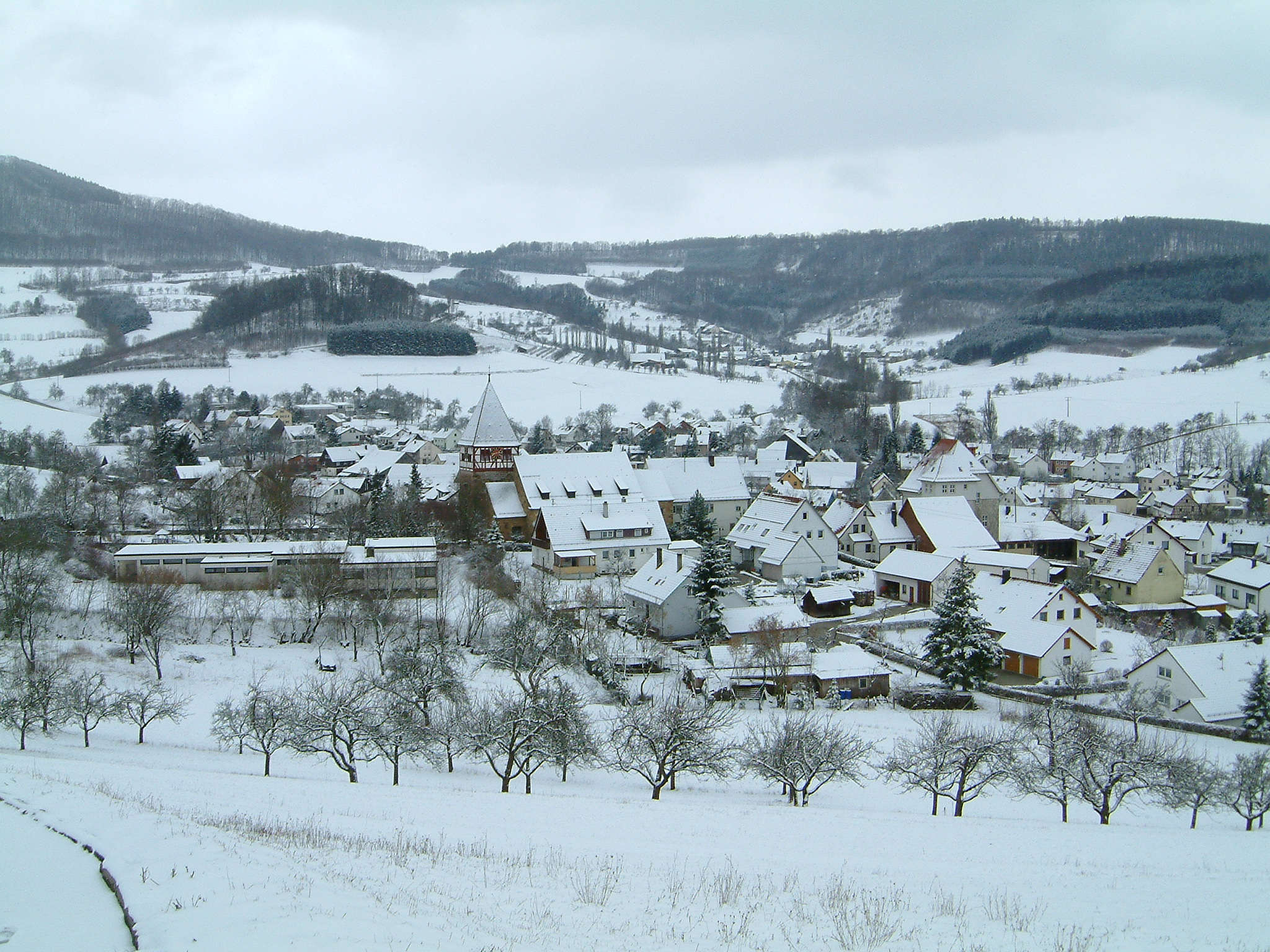 Blick vom Drachenberg auf das winterliche Weiler in den Bergen, Stadt Schwäbisch Gmünd